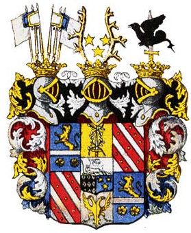 Grevliga ätten nr 48 - Rehnskiöld Utslocknad 1722